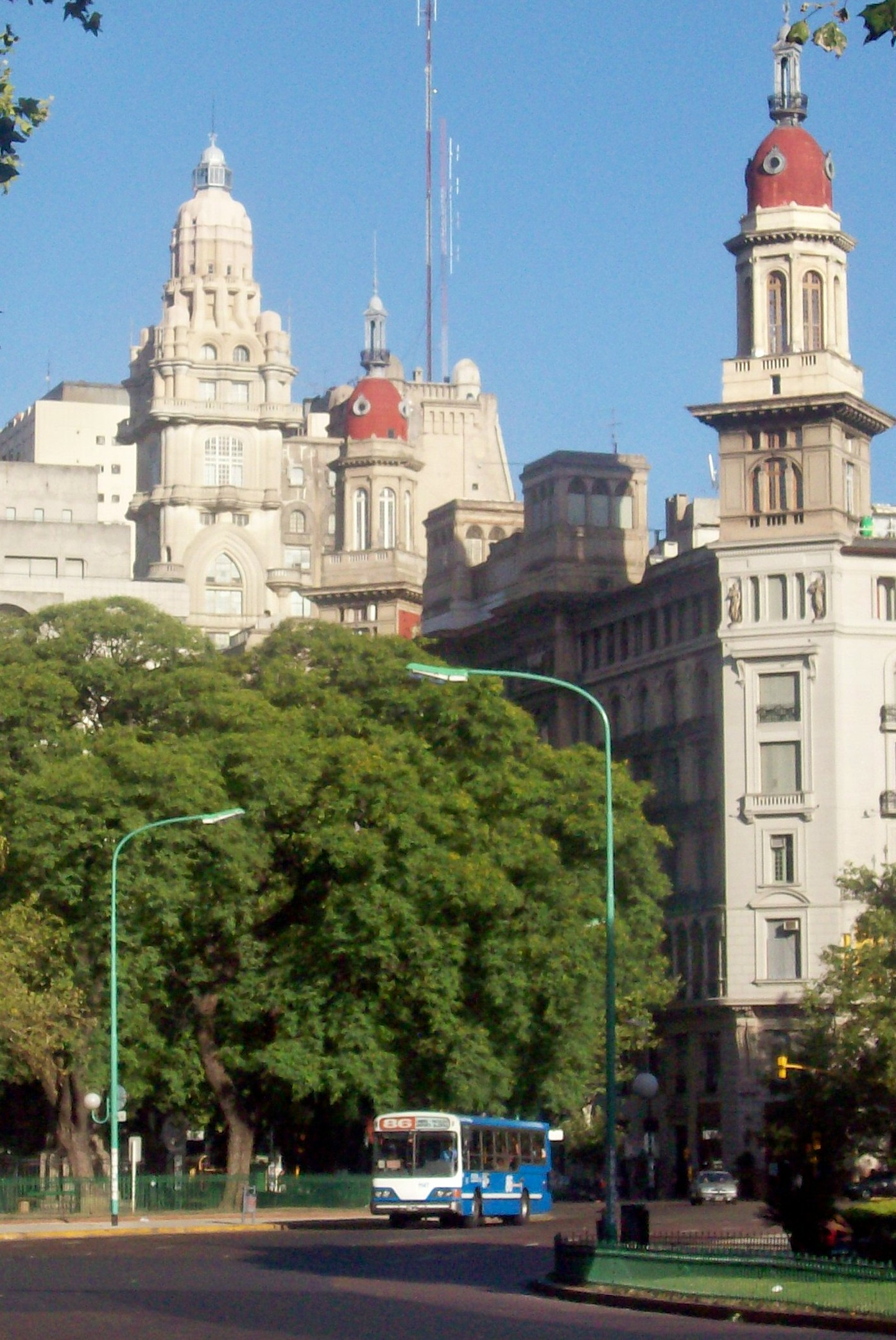 Avenida de Mayo, Buenos Aires, curva final: Pasaje Barolo y Edificio "La Inmobiliaria"